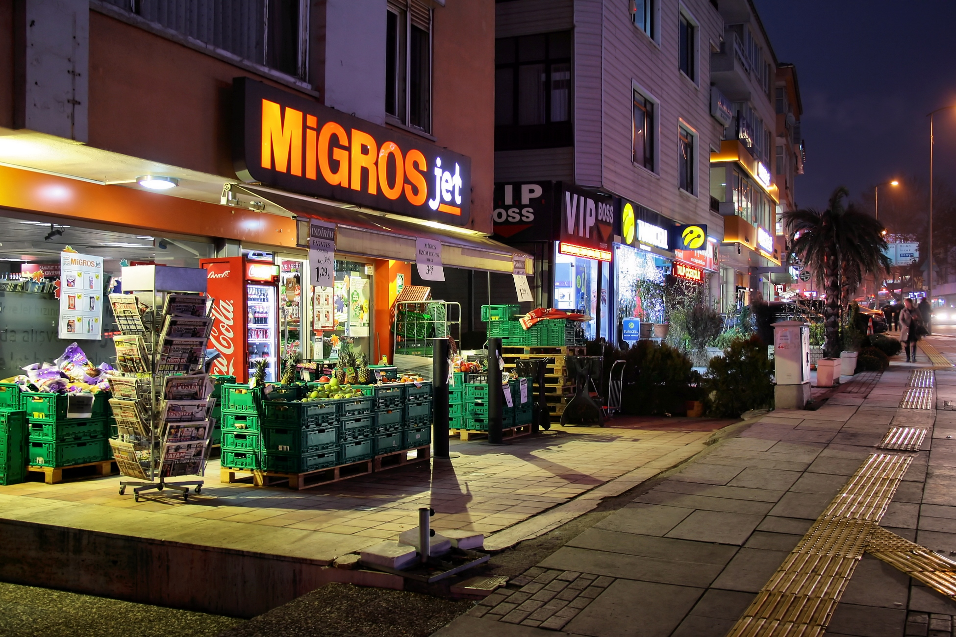 Hoşdere Caddesi